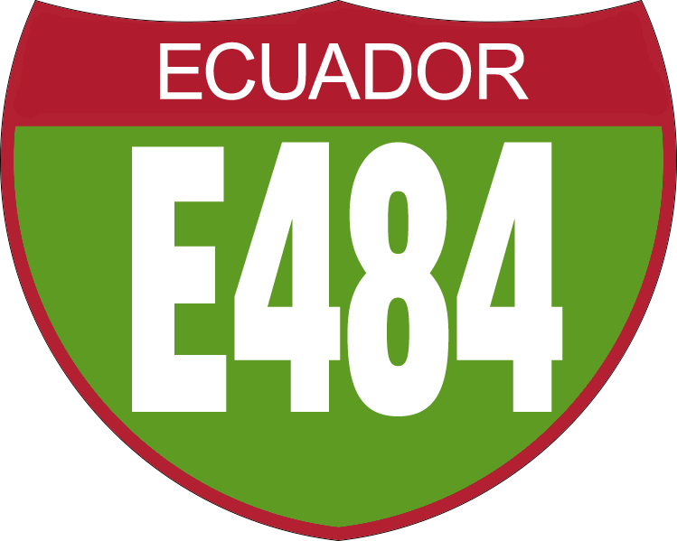 Disco de Identificación Ruta E484